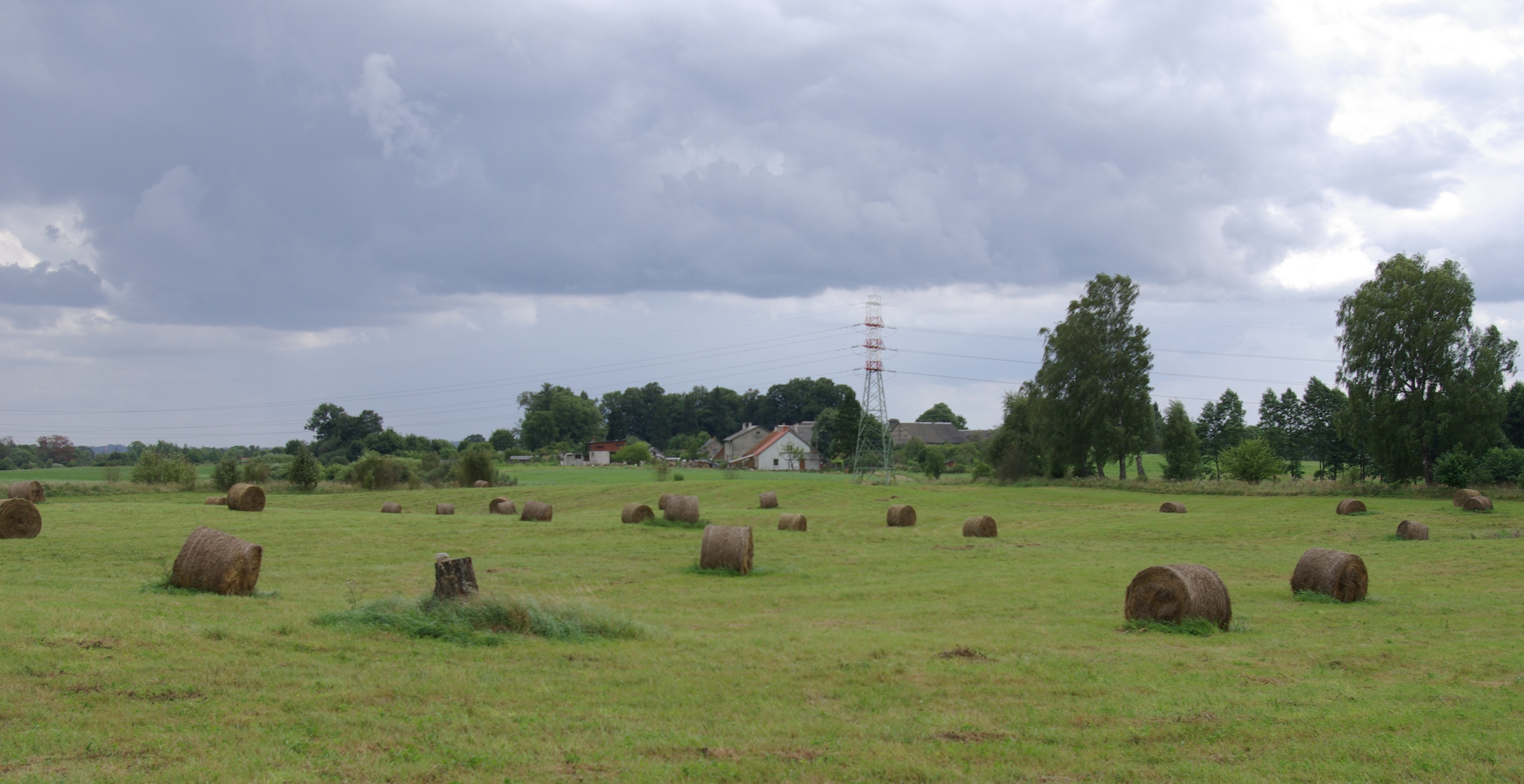 Matyski